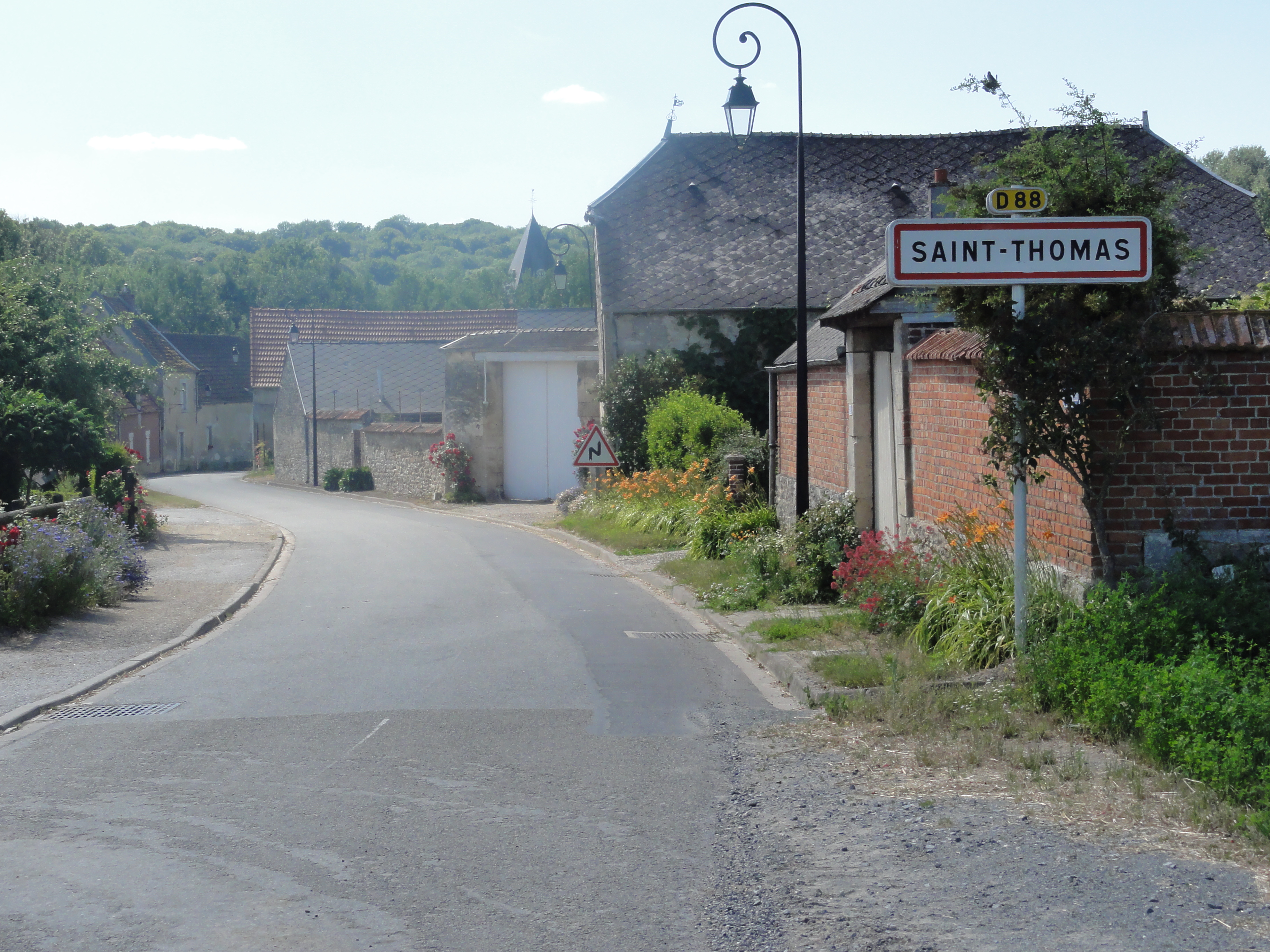 Saint-Thomas (Aisne) city limit sign